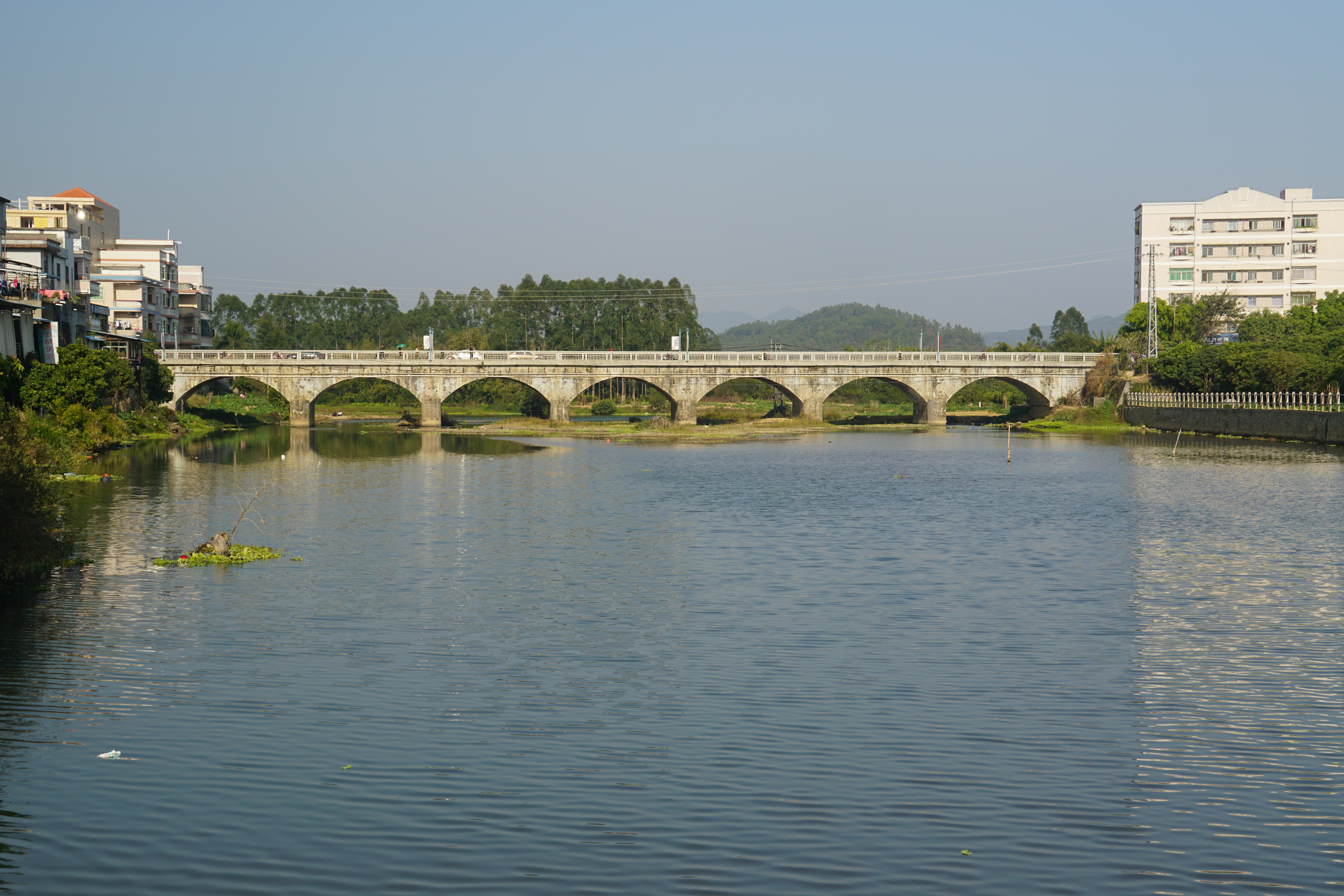 位于增江上的永汉桥。